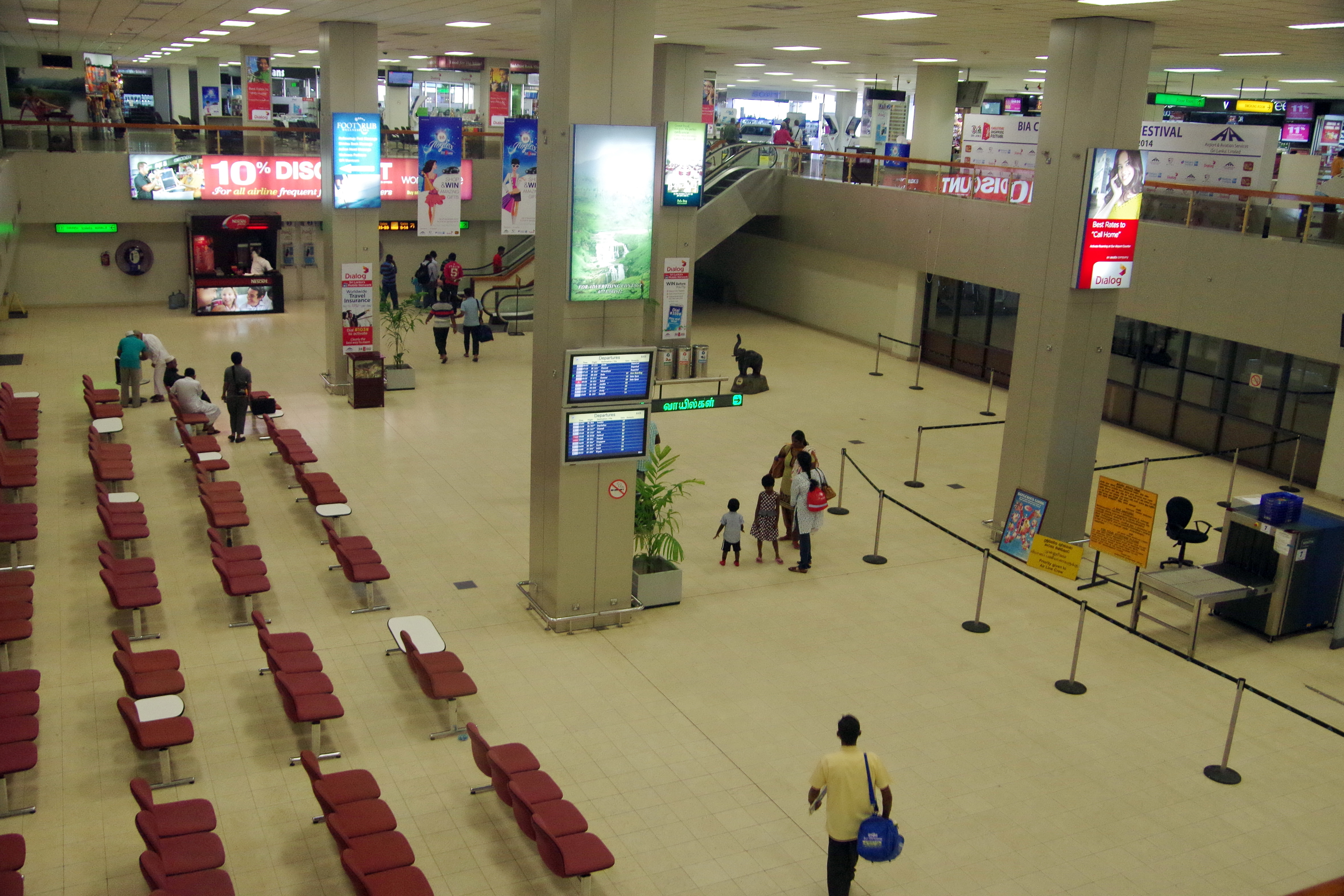 Abflugbereich